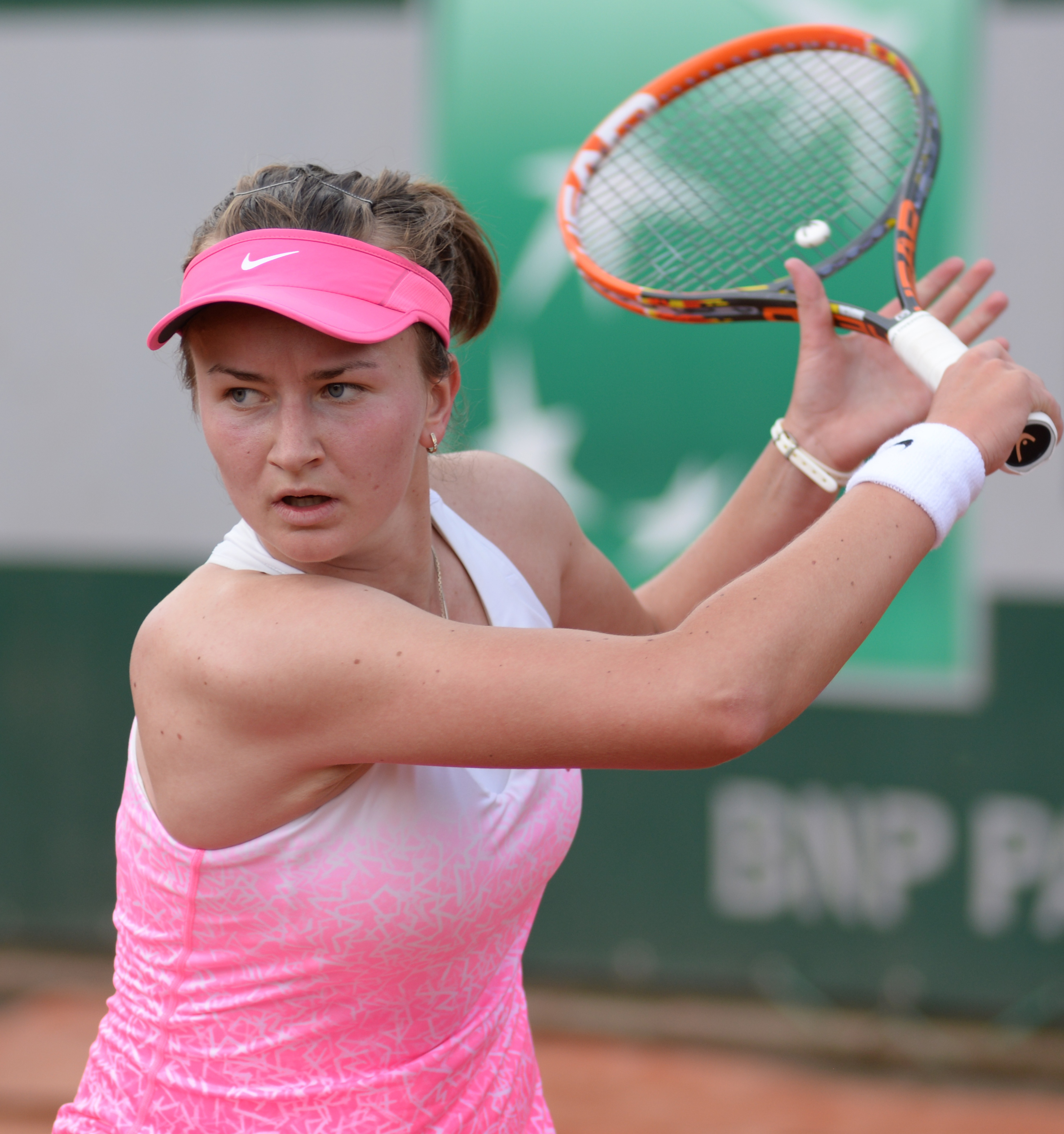 Barbora Krejcikova